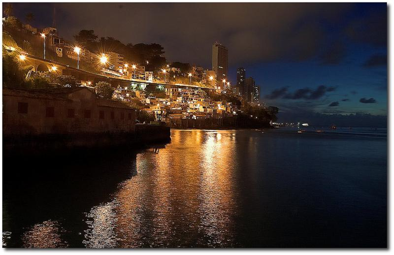 Entardecer no Solar do Unhão, Salvador, Bahia, Brasil.